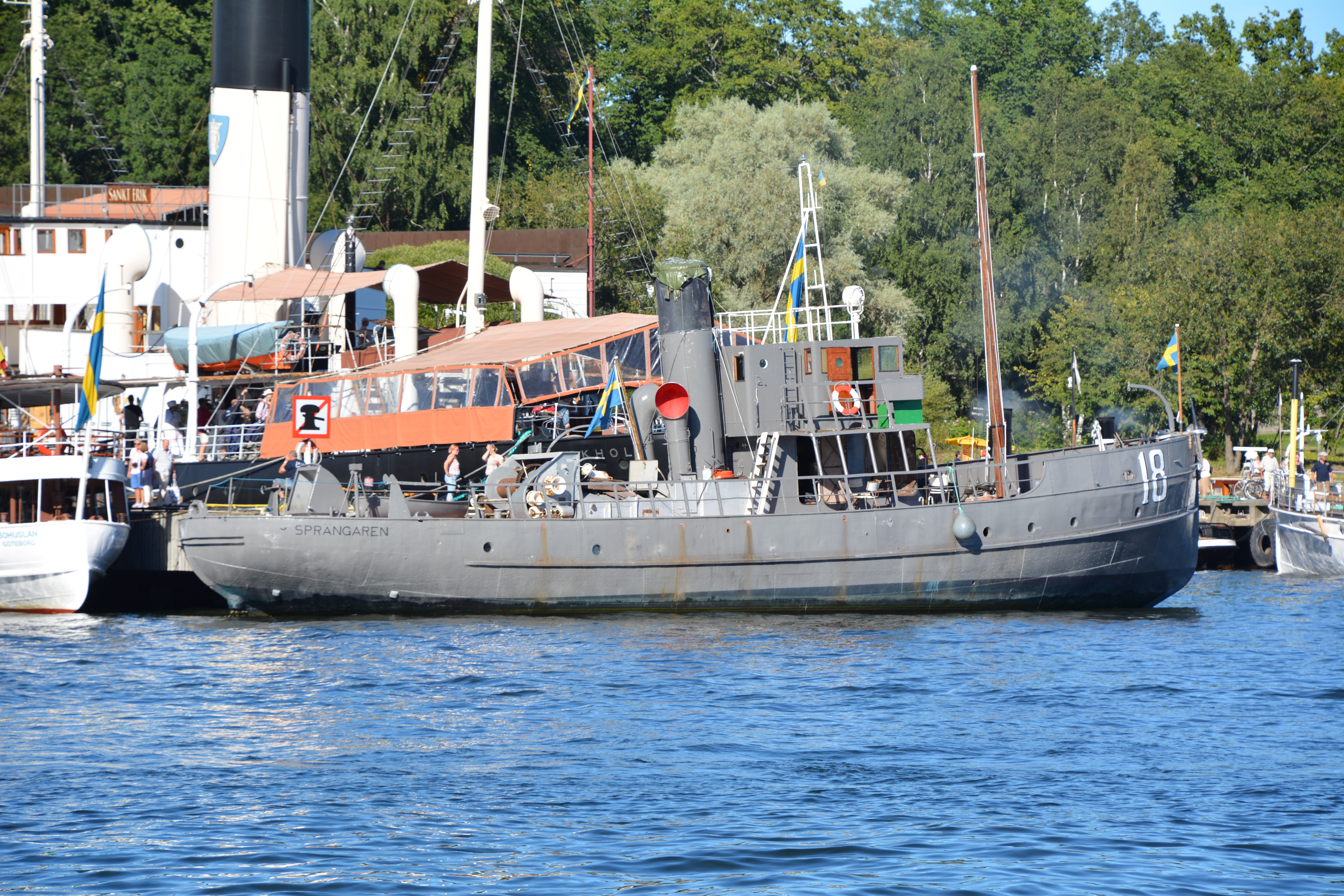 Sprängaren, vid Jagarpiren på Djurgården i Stockholm This is an image of a protected Swedish ship, with call sign SIMV .